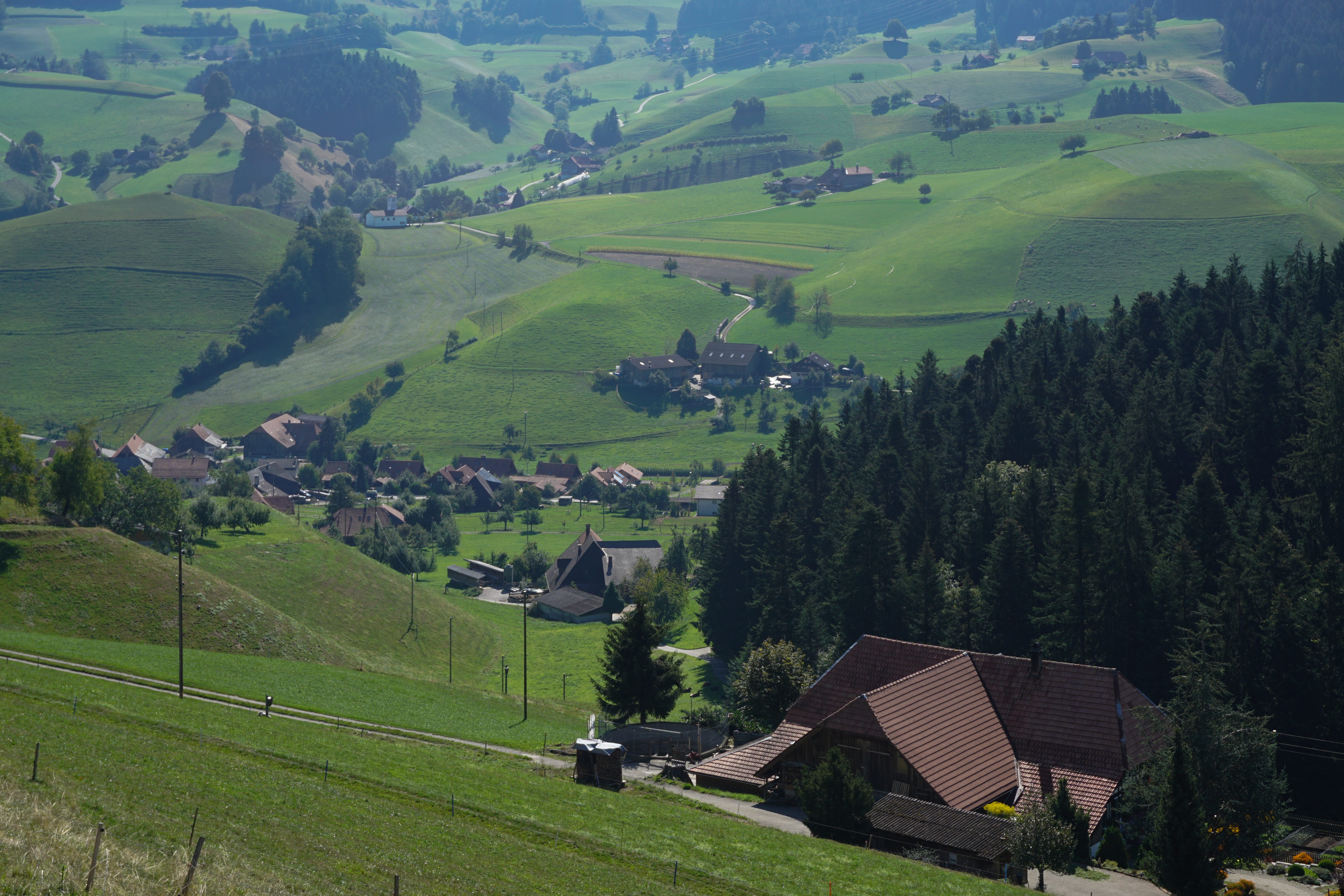 Sicht von Aspihöchi auf Obergoldbach, Kirche Landiswil und Landiswil-Lindacker